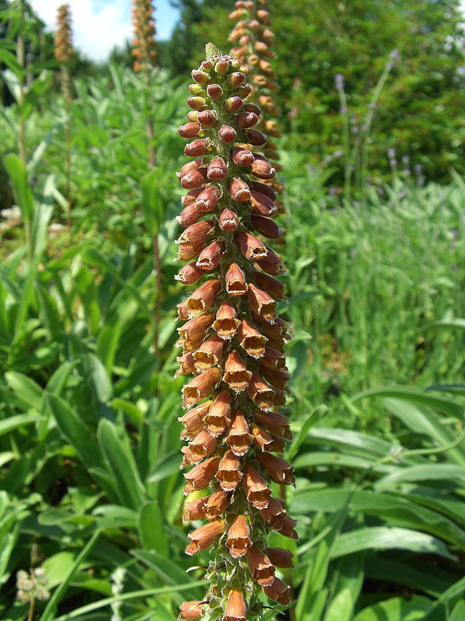 Digitalis parviflora - inflorescense